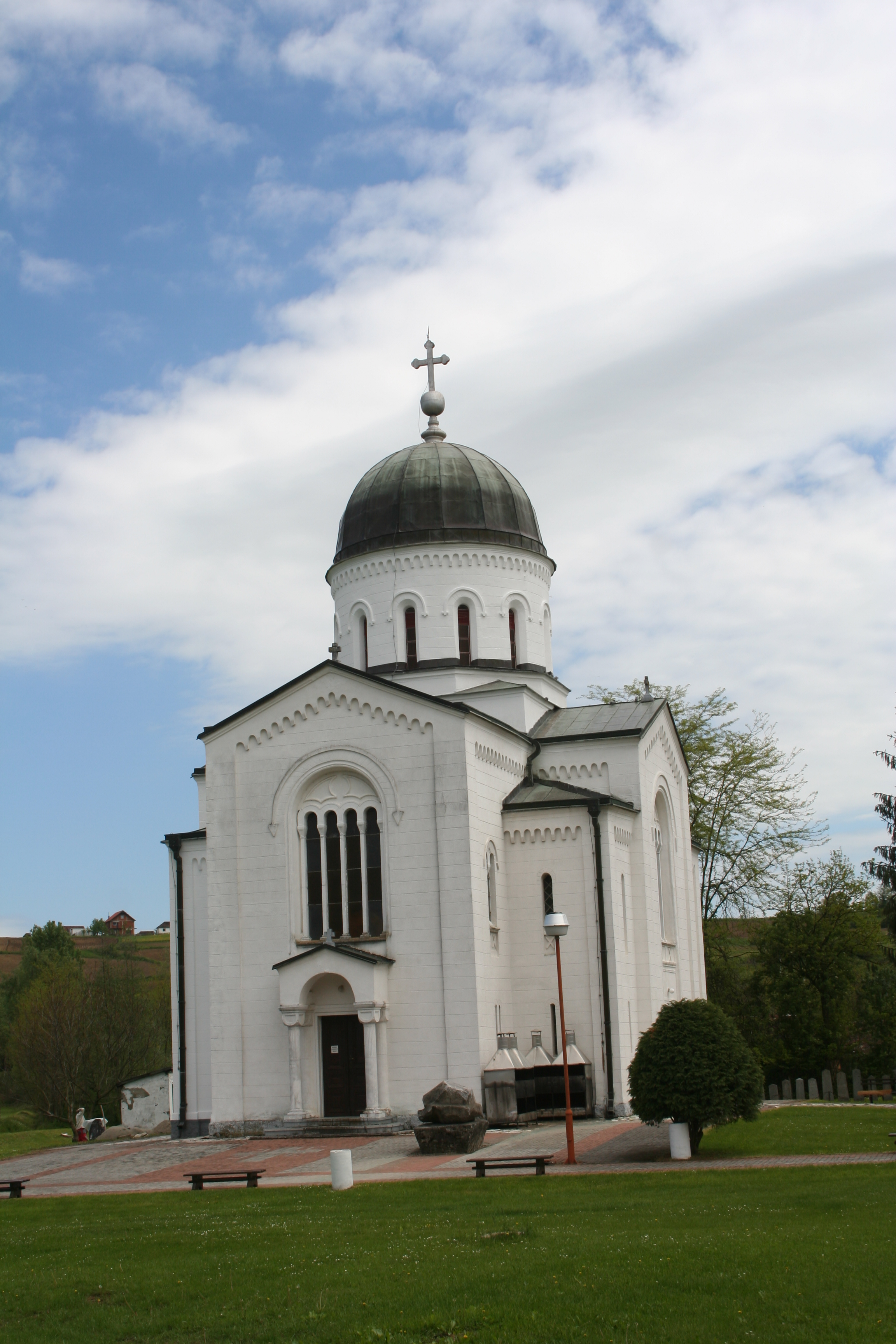 Crkva Sv. Georgija (Bela Crkva)